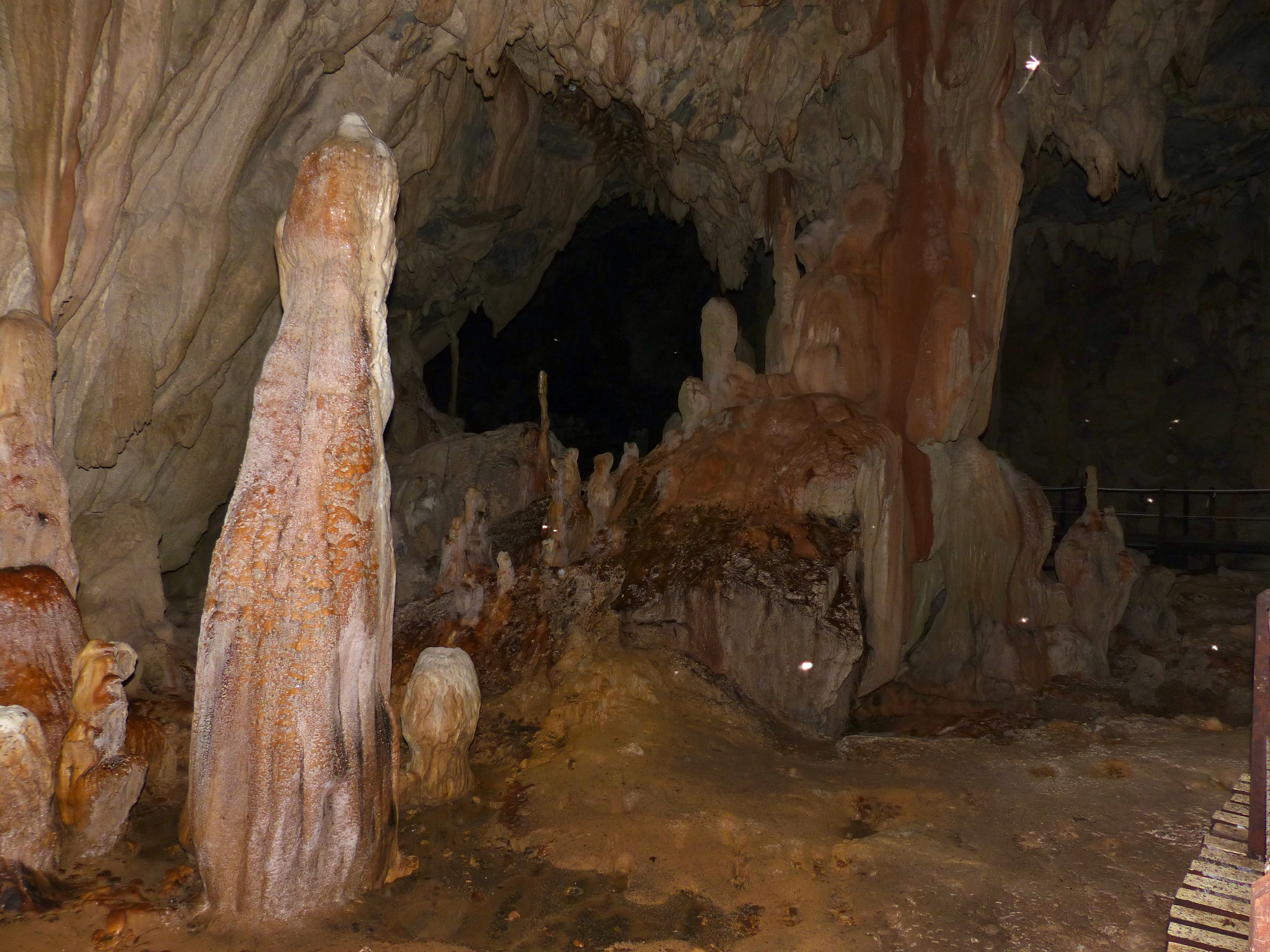 Lagang Cave, Mulu NP, Sarawak, MALAYSIA